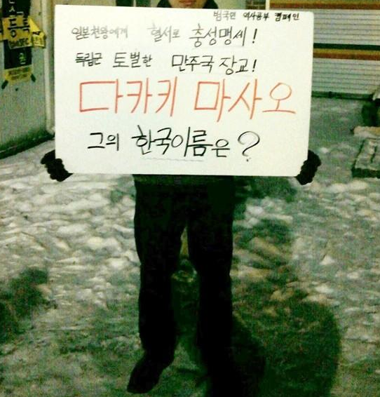 다카키마사오